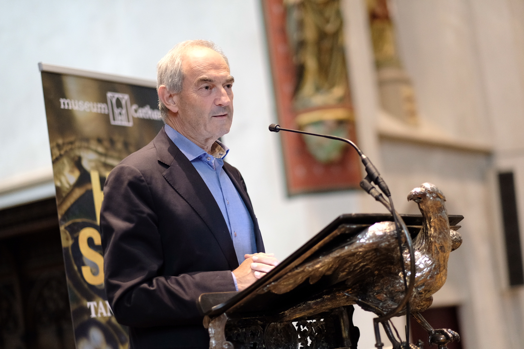 Museum Catharijneconvent - opening tentoonstelling Heilig Schrift